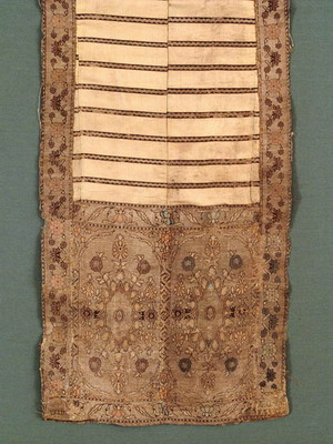 Слуцкі пояс, XVIII ст.